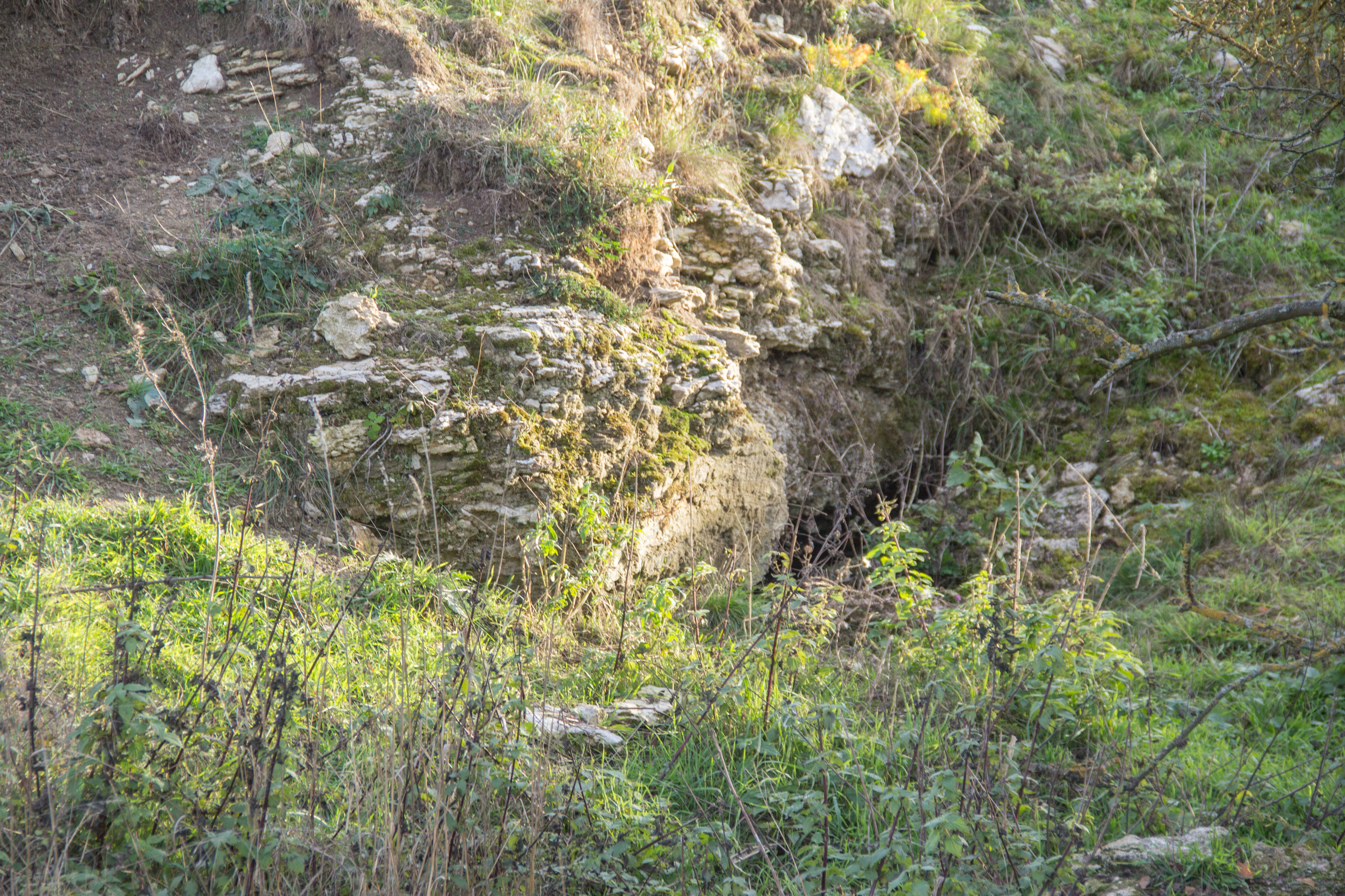 Geotop, Gipshöhle Höllern, Markt Nordheim, Höhleneingang